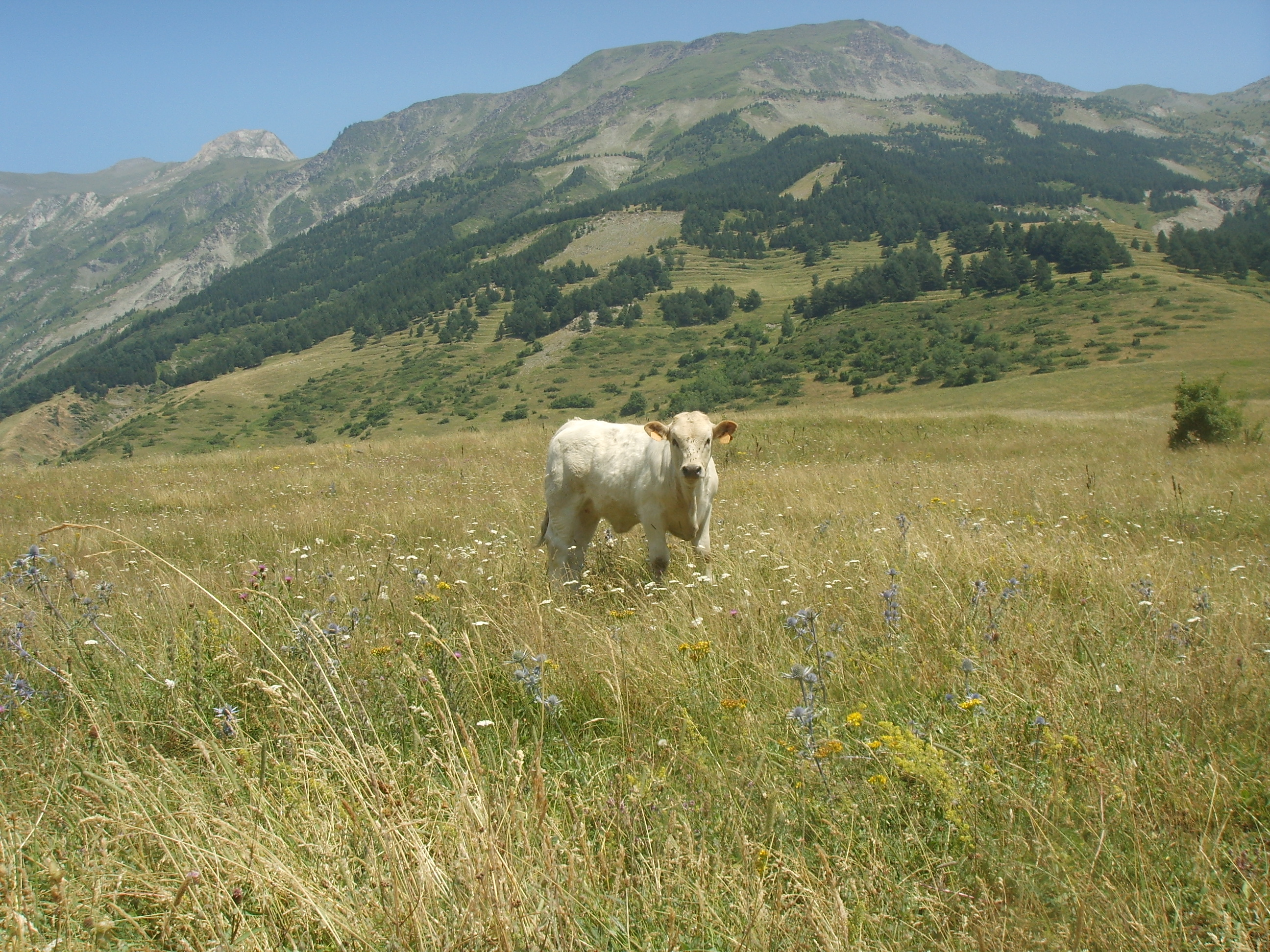 Ternera en un prado del valle de Arán, en los Pirineos